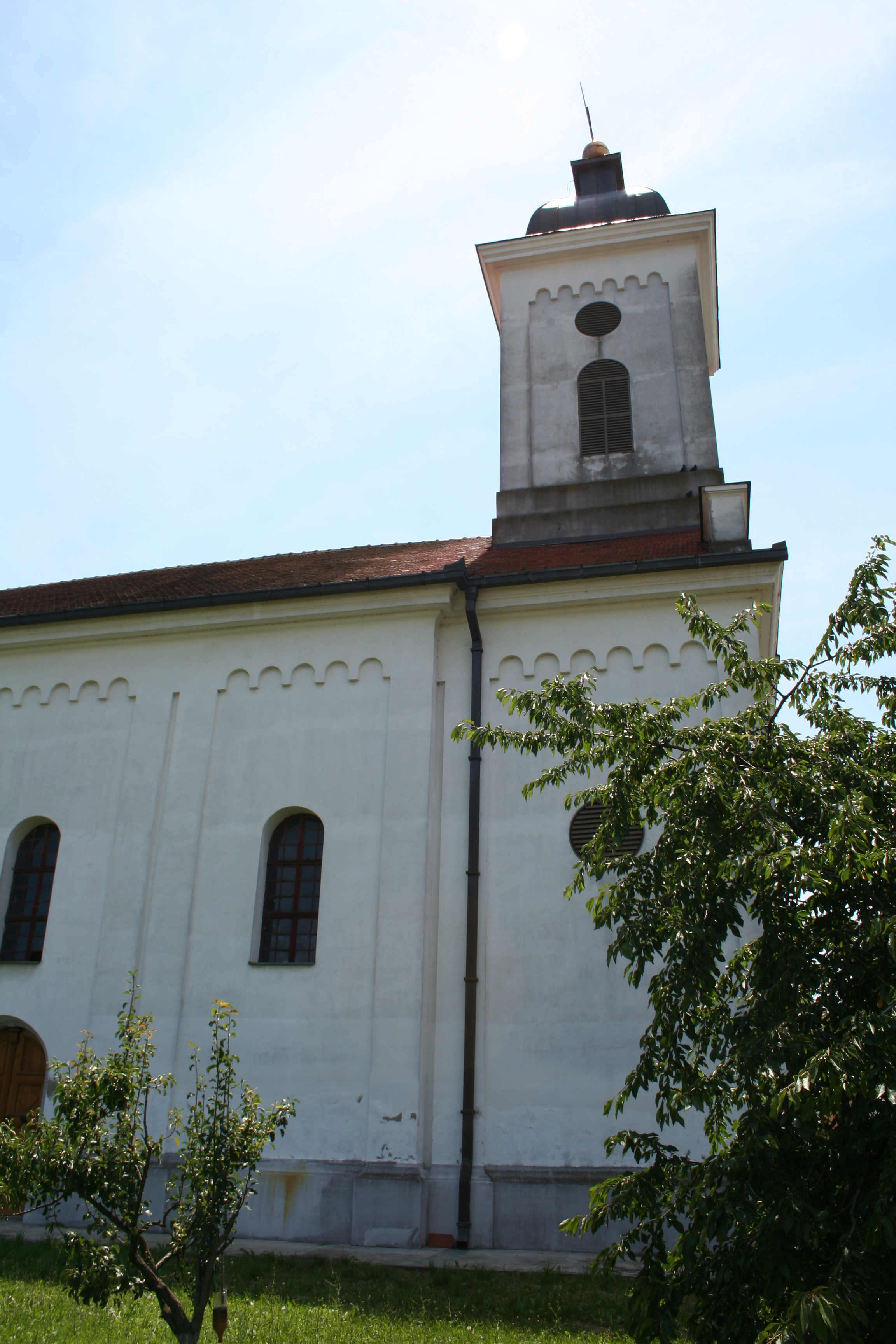 Crkva Sv. apostola Tome, Bogatić